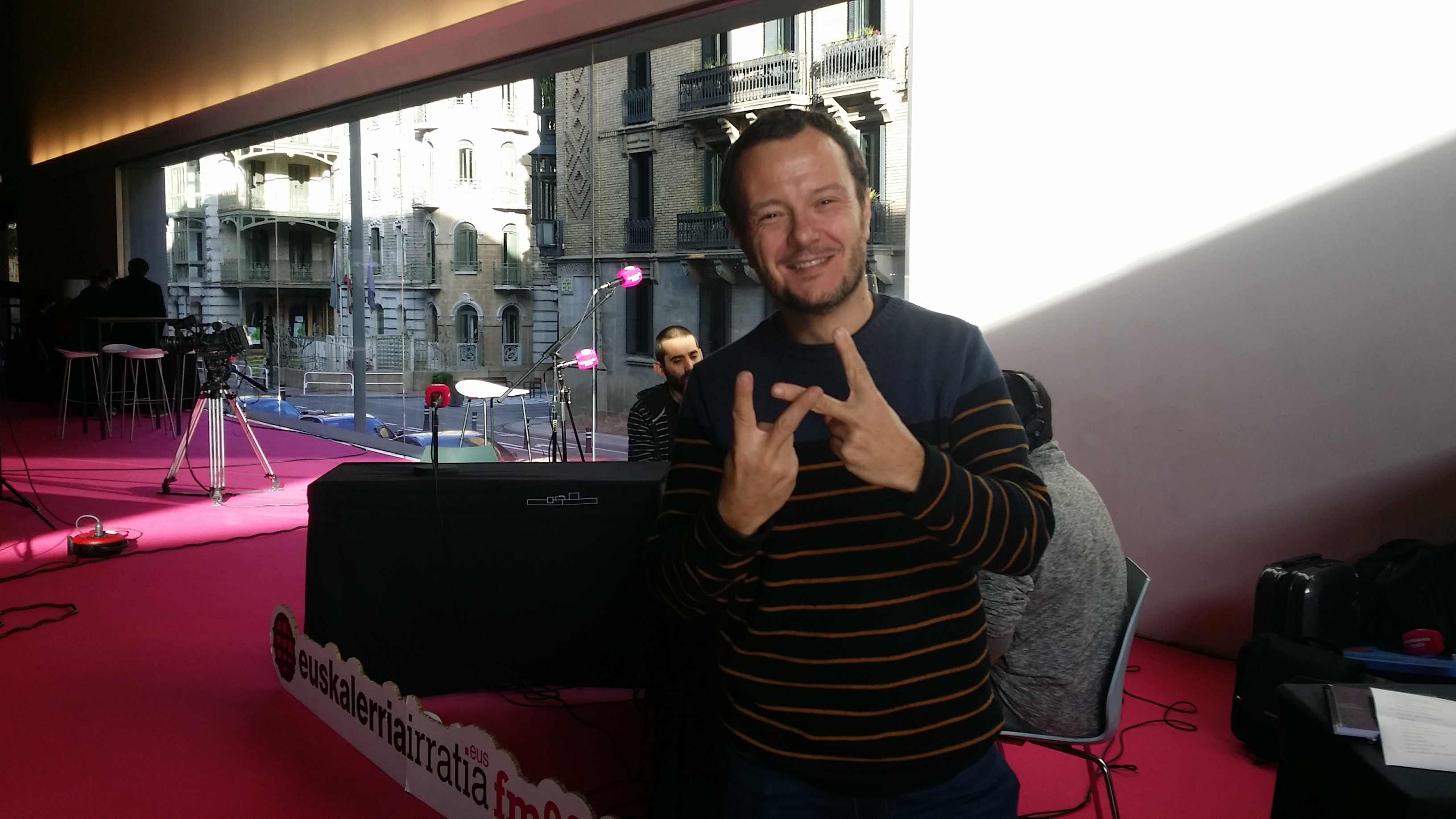 Juan Kruz Lakasta 948 Merkatuan, Baluarten, 2017ko azaroaren 16an.